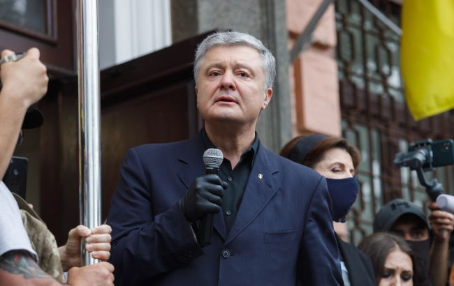 Петро Порошенко біля Печерського суду, 18.06.2020